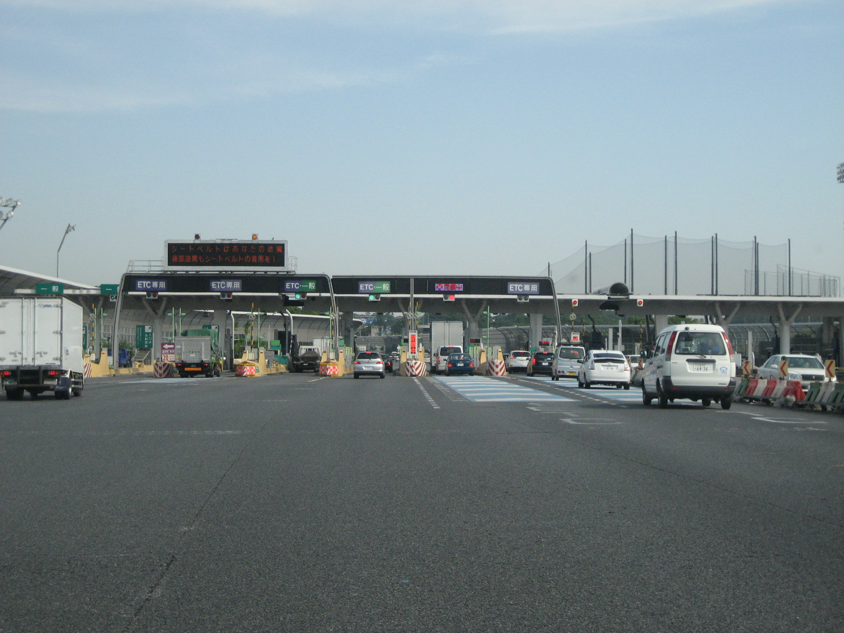 関越自動車道新座料金所